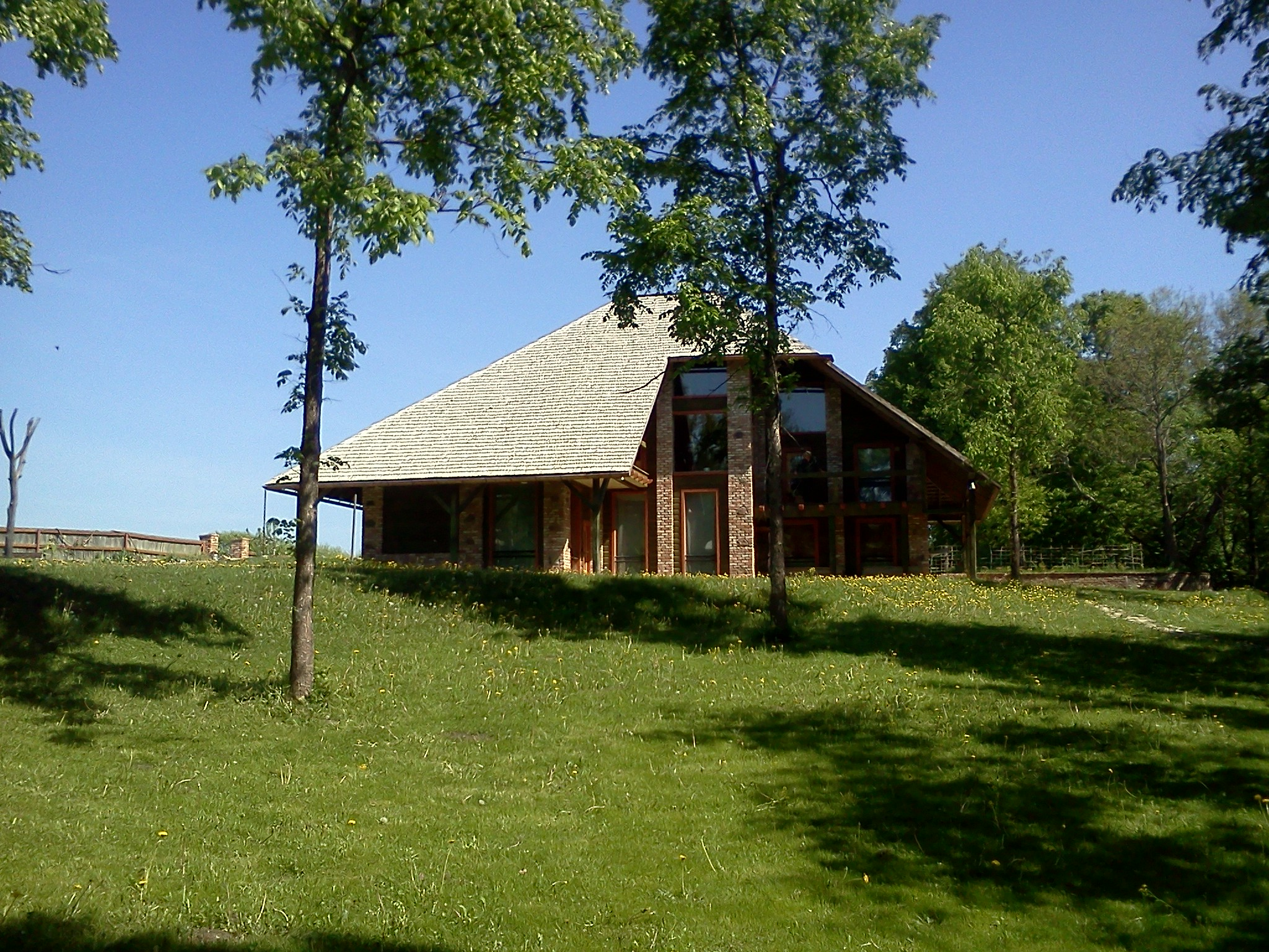 Dobelnieki